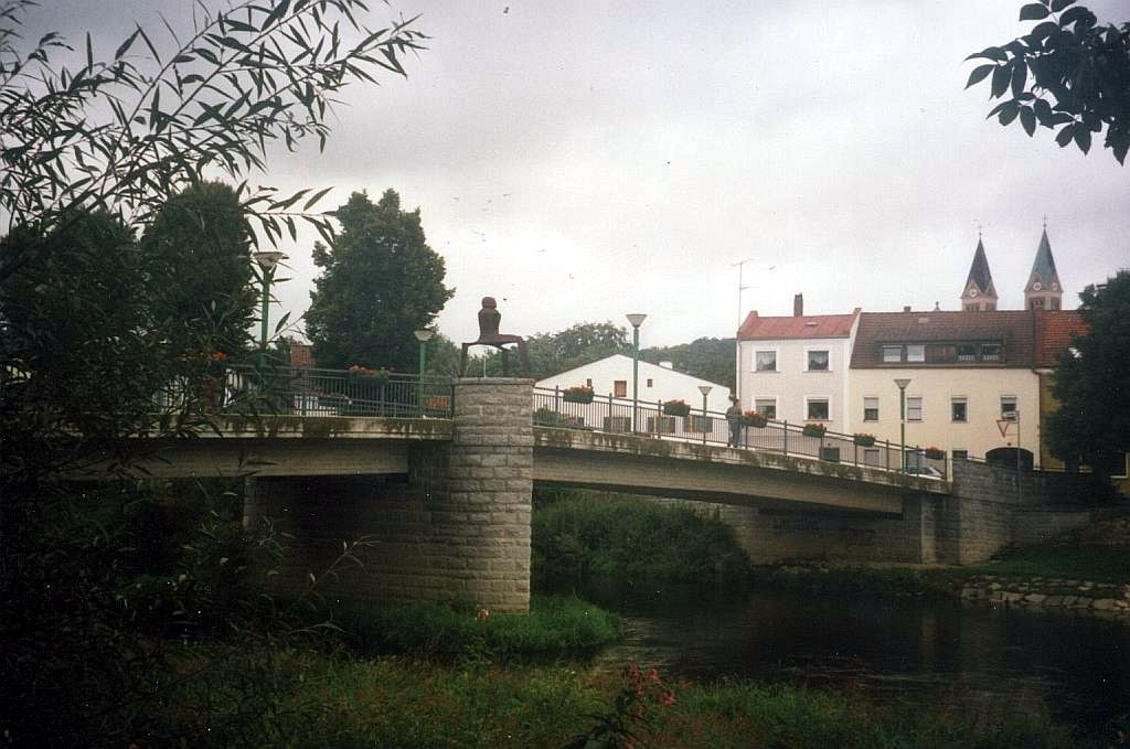 Neue Florian-Geyer-Brücke in Cham (Oberpfalz)